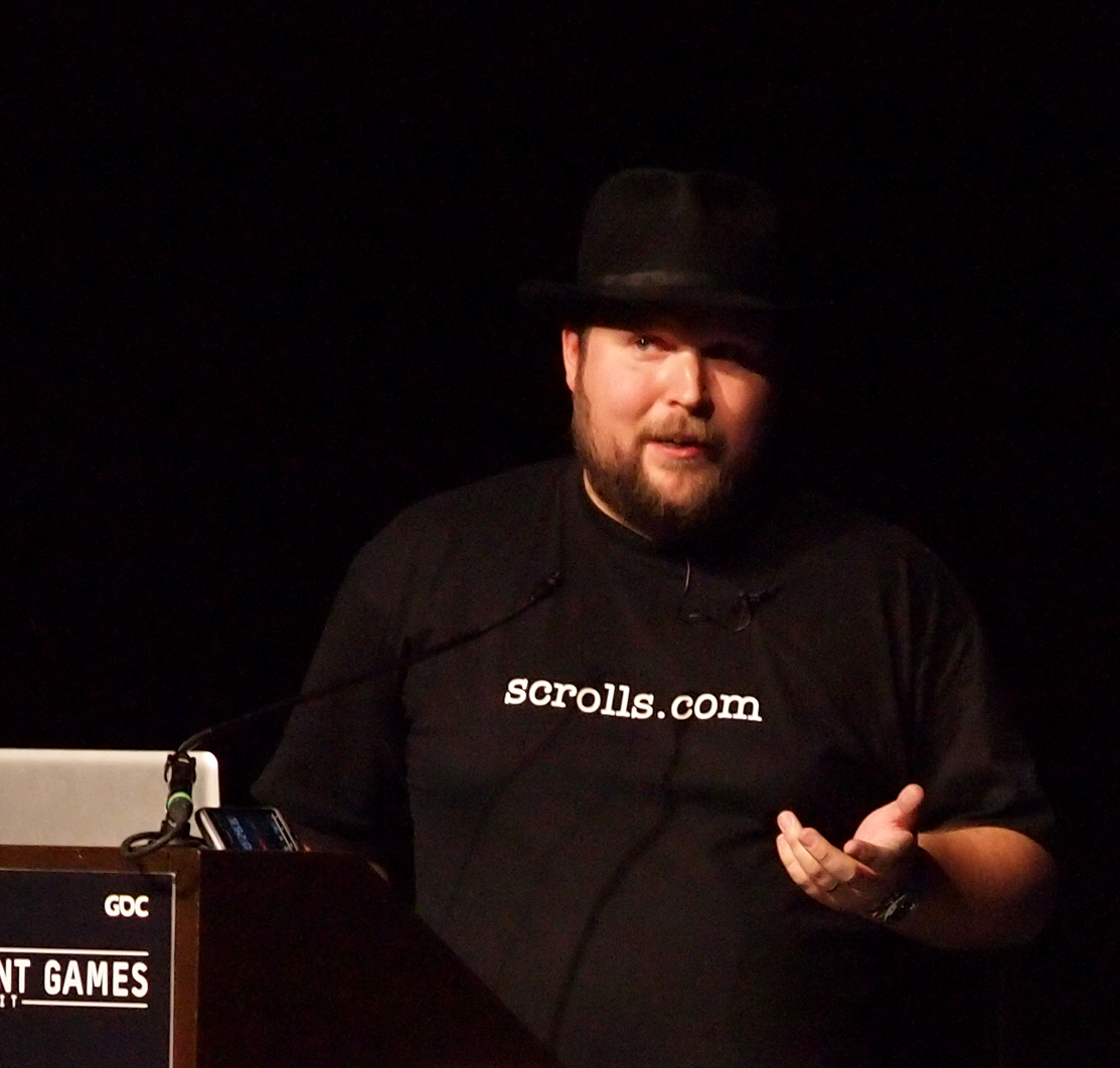 Markus Persson at GDC 2011